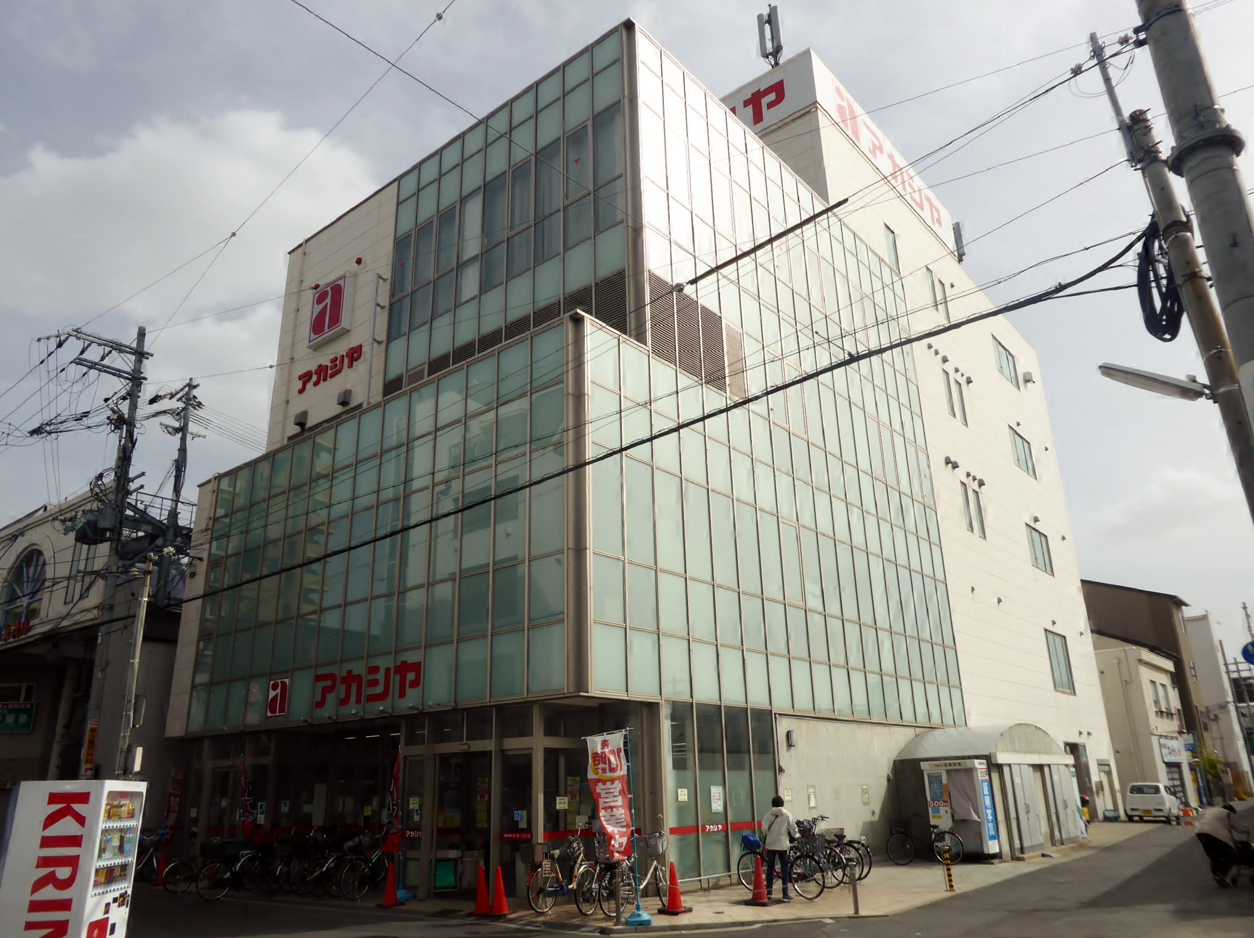 アカシヤビルを撮影。